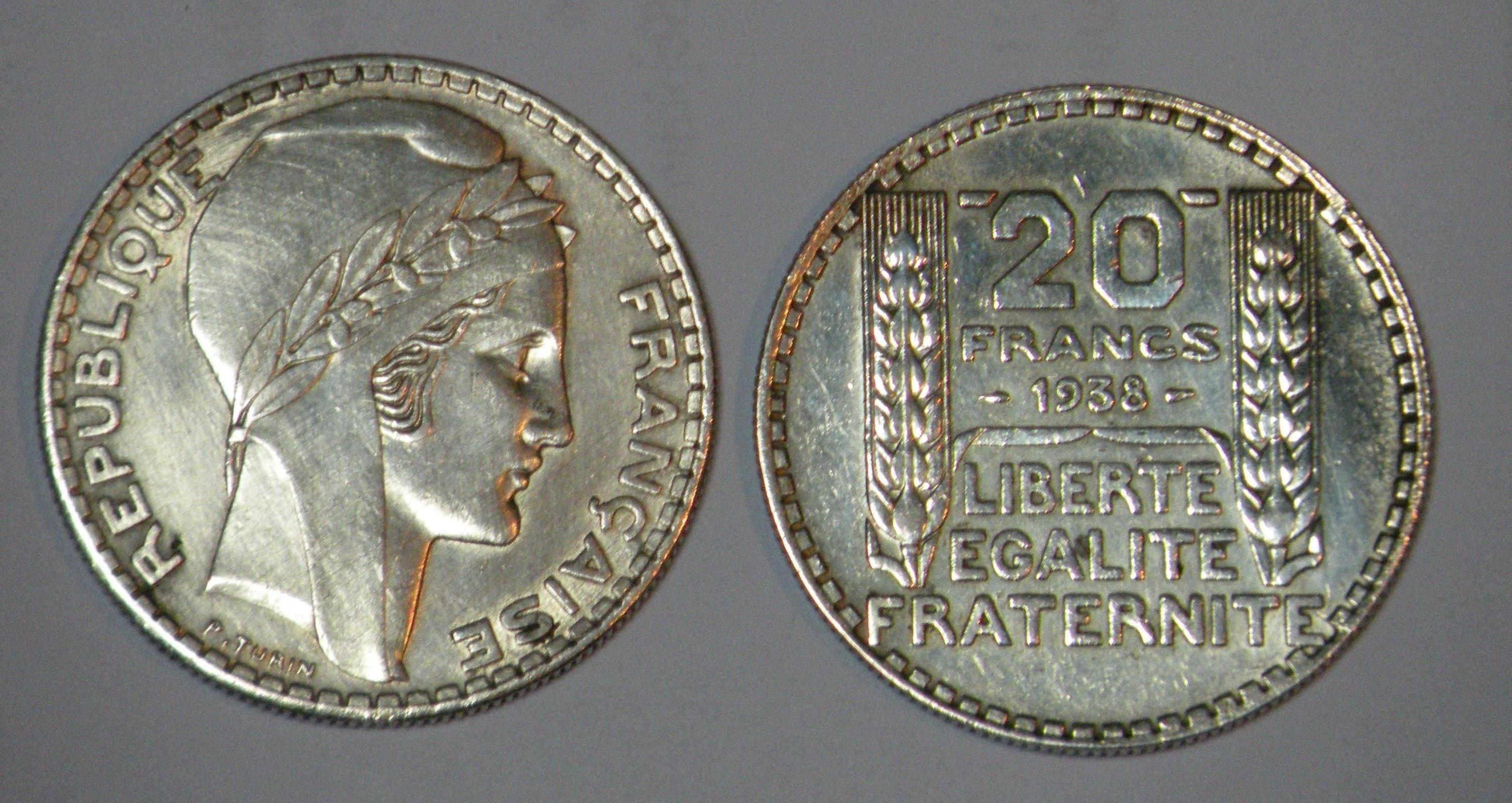 pièces en argent de 20 francs français de 1938